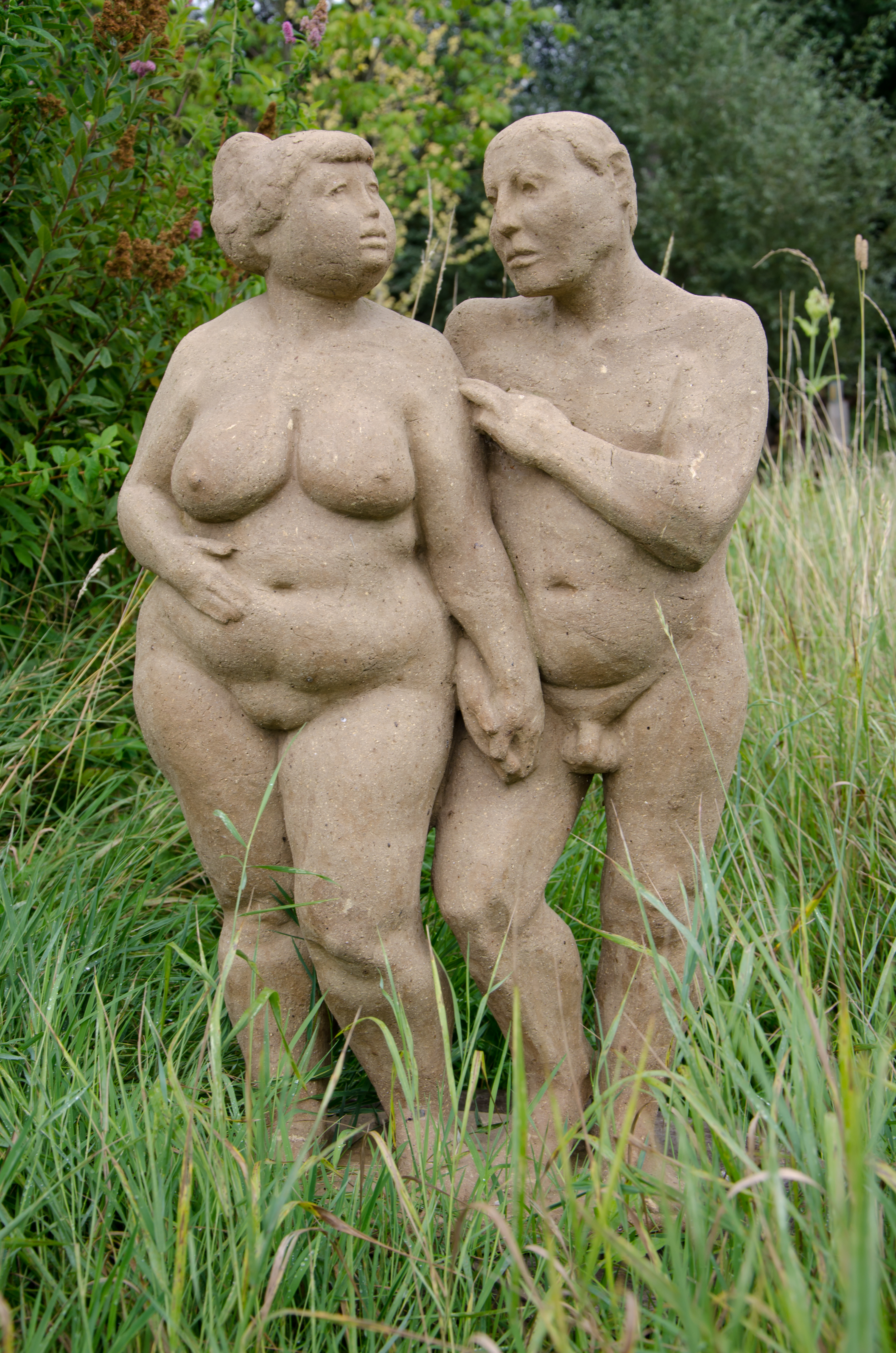 Fritz Böhme - "Paar" im Skulpturenpark Glashagen